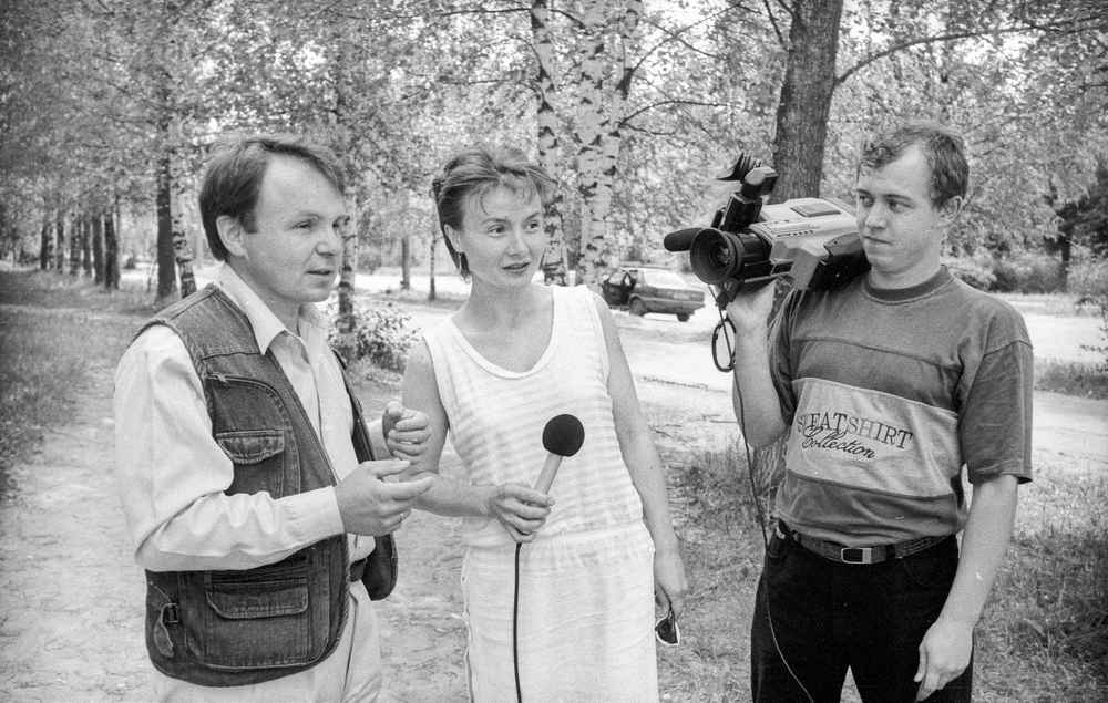 Сотрудники телеканала «Переславль» редактор Игорь Викторович Горин (с микрофоном), корреспондент Елена Вадимовна Морозова и оператор Сергей Евгеньевич Градин (с видеокамерой).